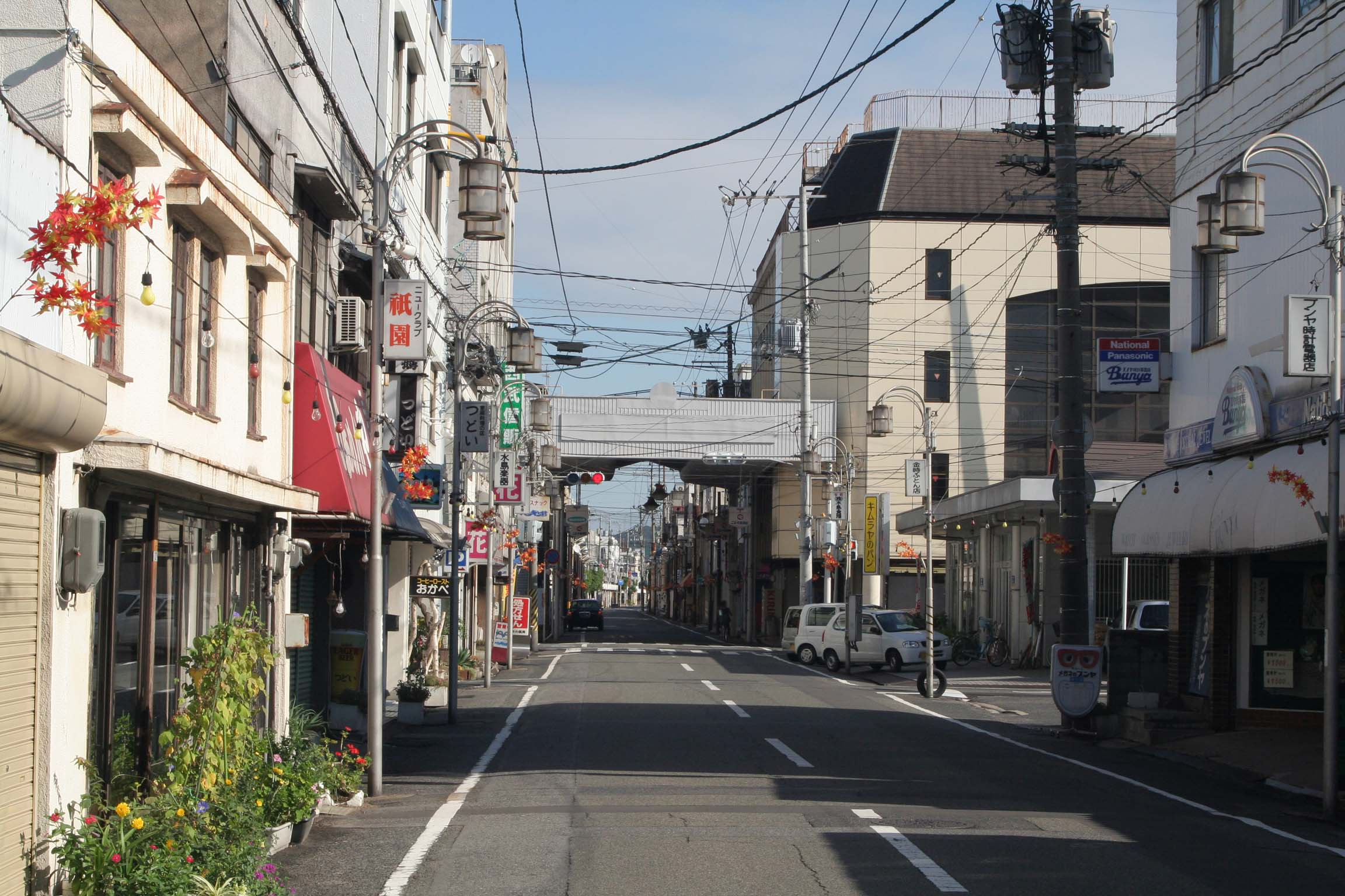 常盤商店街